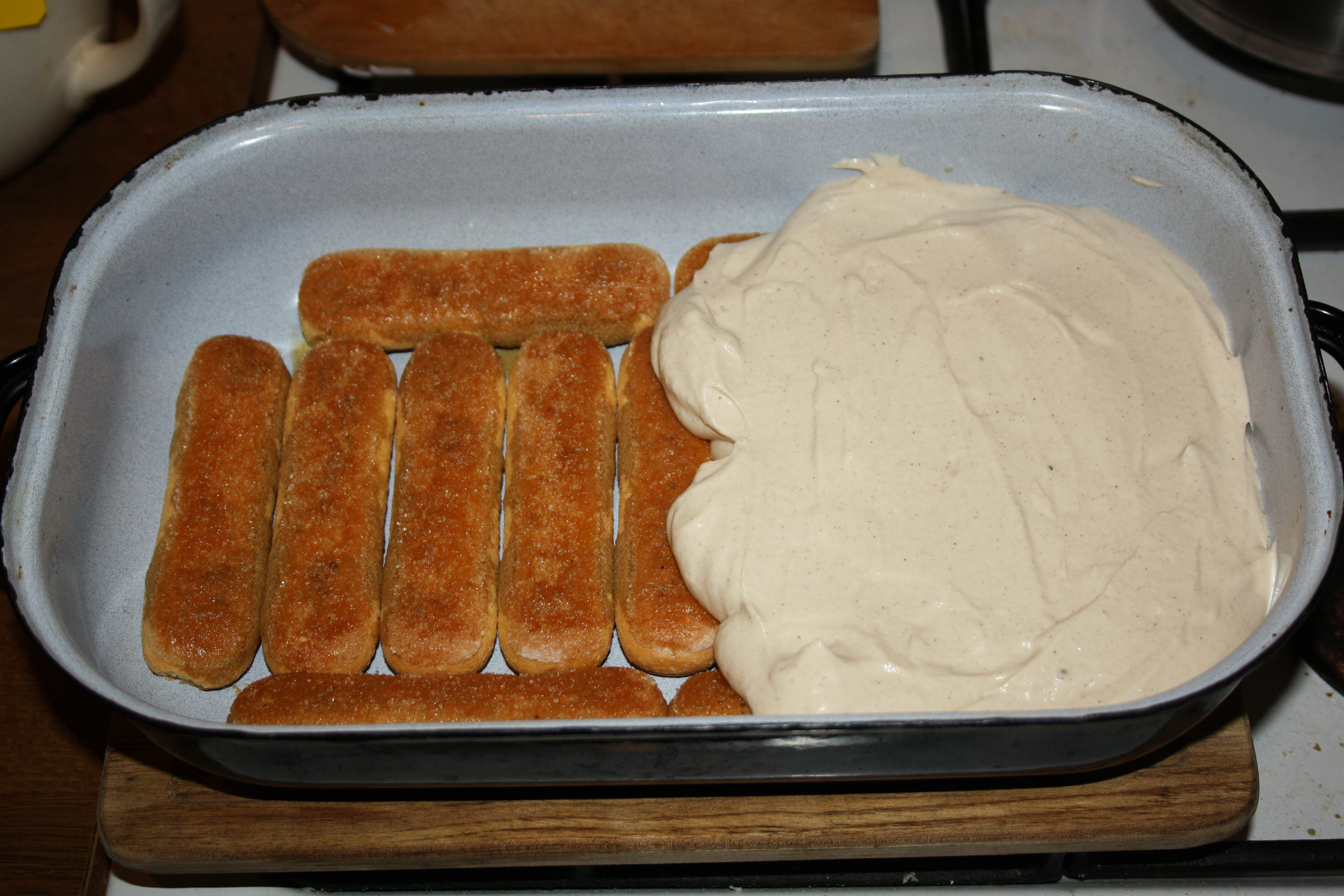 Tvarohové tiramisu - pokrývání první vrstvy piškotů krémem